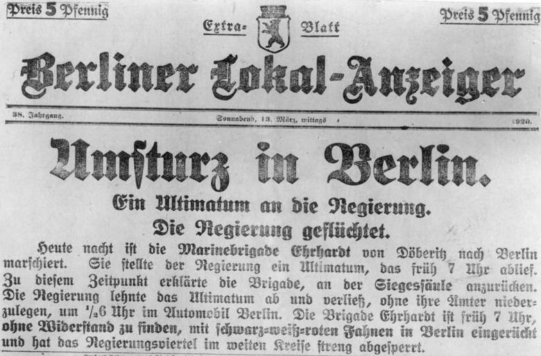 ADN-ZB/Archiv Konterrevolutionärer Kapp-Putsch (13.-17.3. in Berlin). Die etwa 5000 Mann starke Marinebrigade II unter dem Befehl von Kapitän Hermann Ehrhardt marschiert, aus Döberitz kommend, in den frühen Morgenstunden des 13. März in Berlin ein. Die Brigade bildet die militärische Stoßkraft des von Wolfgang Kapp und General Walther von Lüttwitz geführten Putsches. Extrablatt des "Berliner Lokal-Anzeiger" vom Mittag des 13. März mit Nachrichten über den Putsch. (25 958-33)